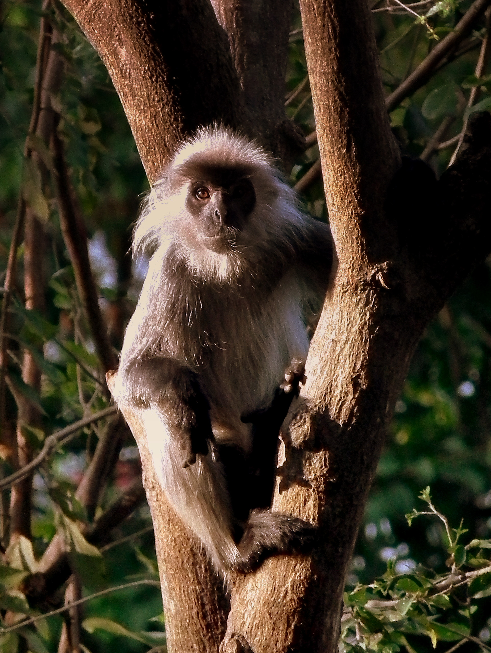 SAIGON ZOO VIETNAM JAN 2012